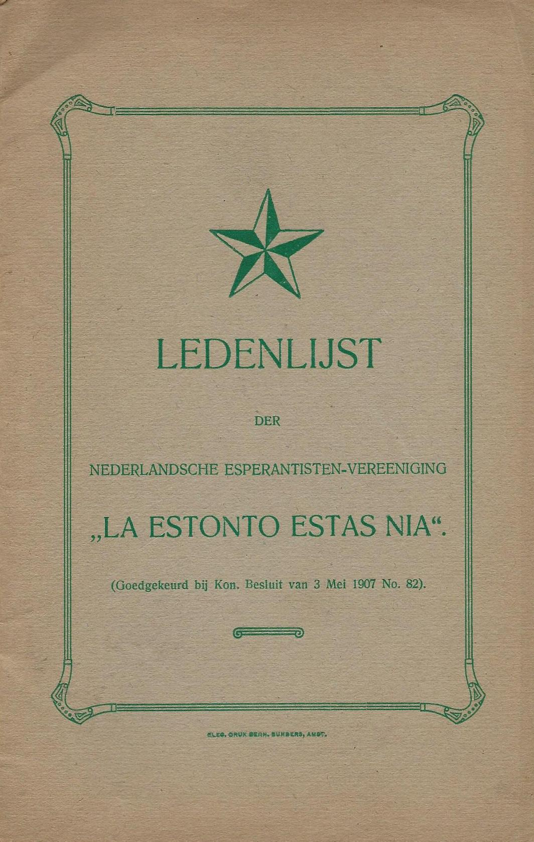 librokovrilo de "Ledenlijst der Nederlandsche Esperantisten-vereniging "La Estonto estas Nia" ", 1909